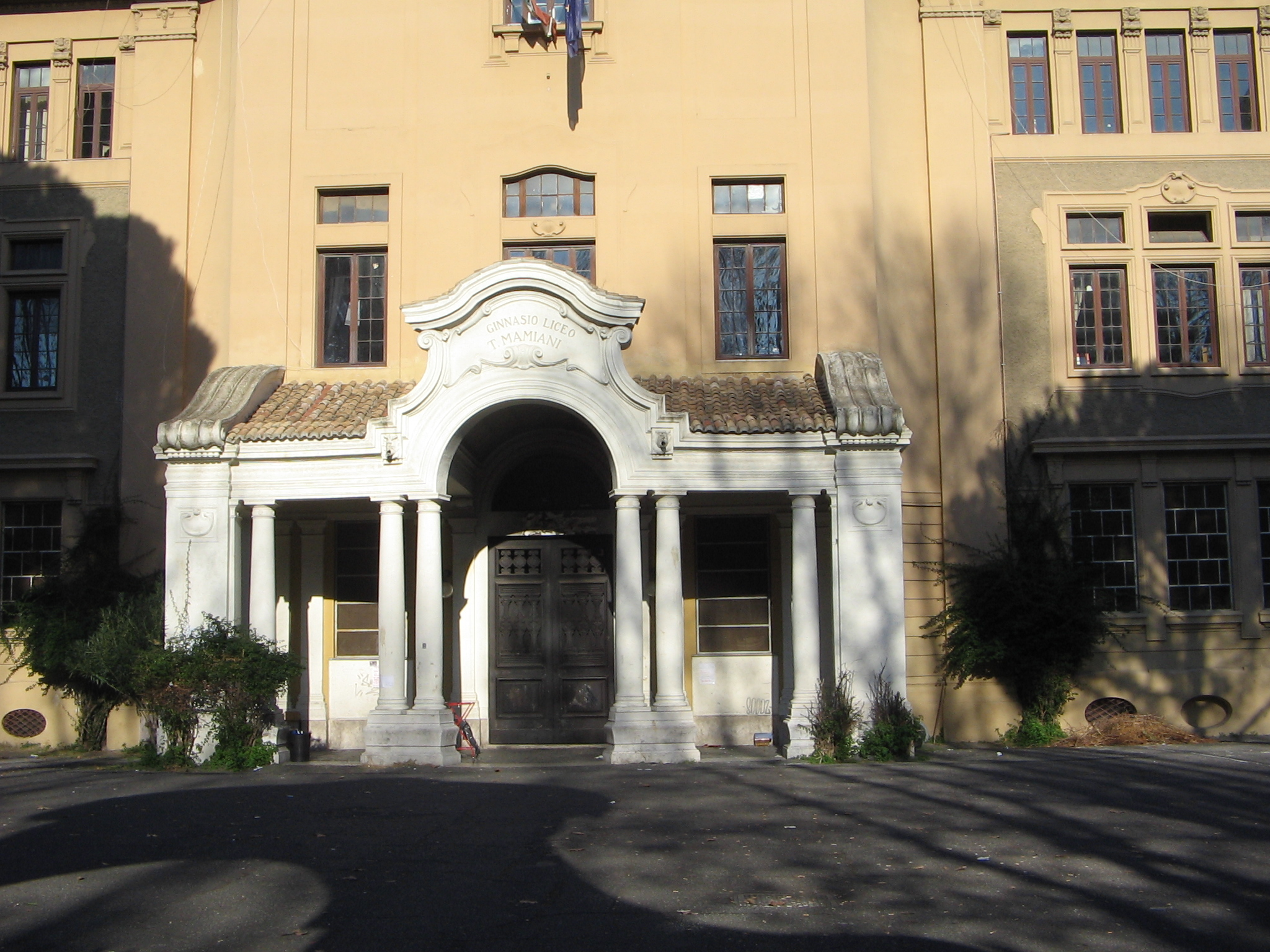 Liceo Mamiani di Roma nel quartiere Della Vittoria